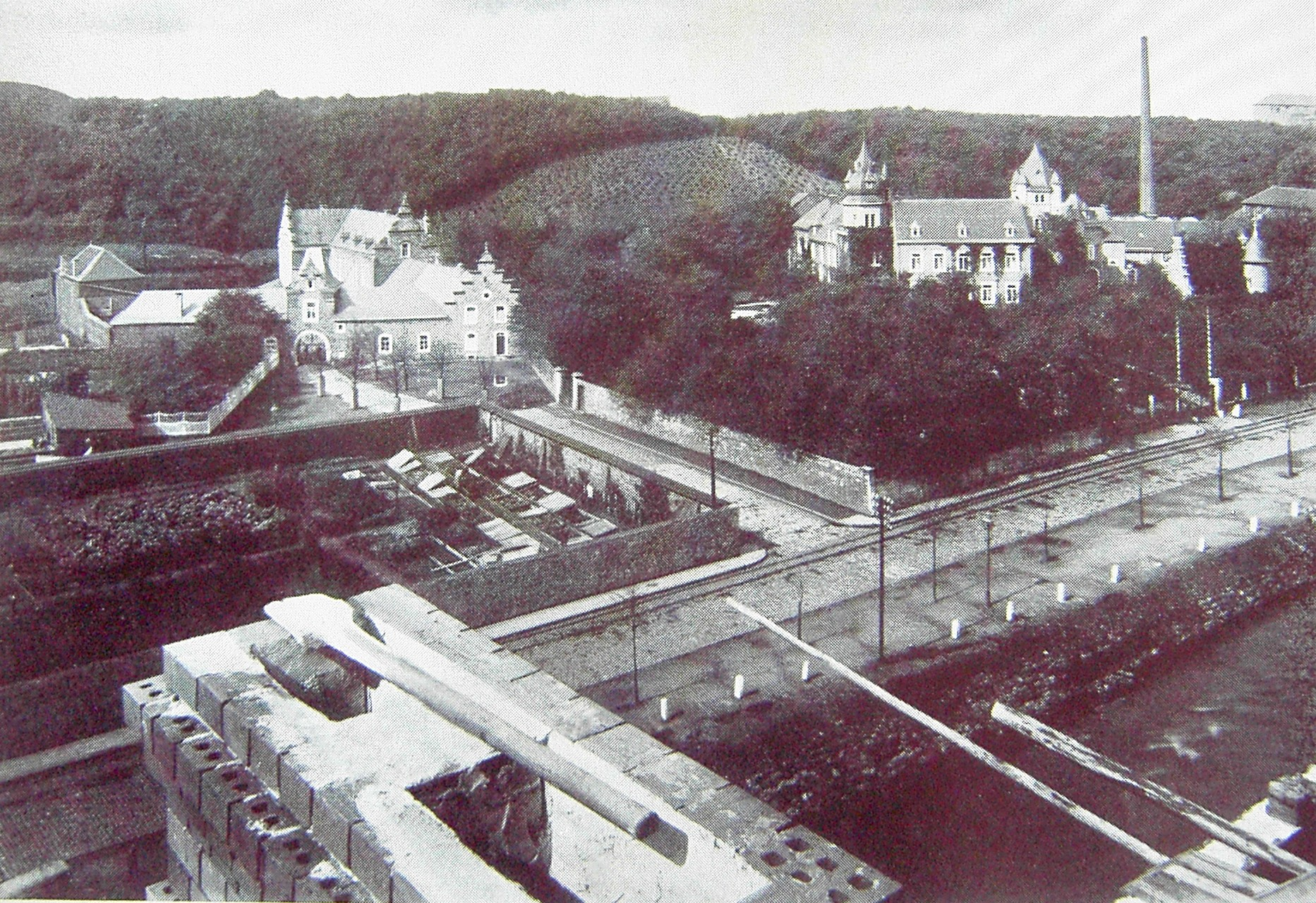 Kupferhöfe Weide und Unterster Hof um 1905